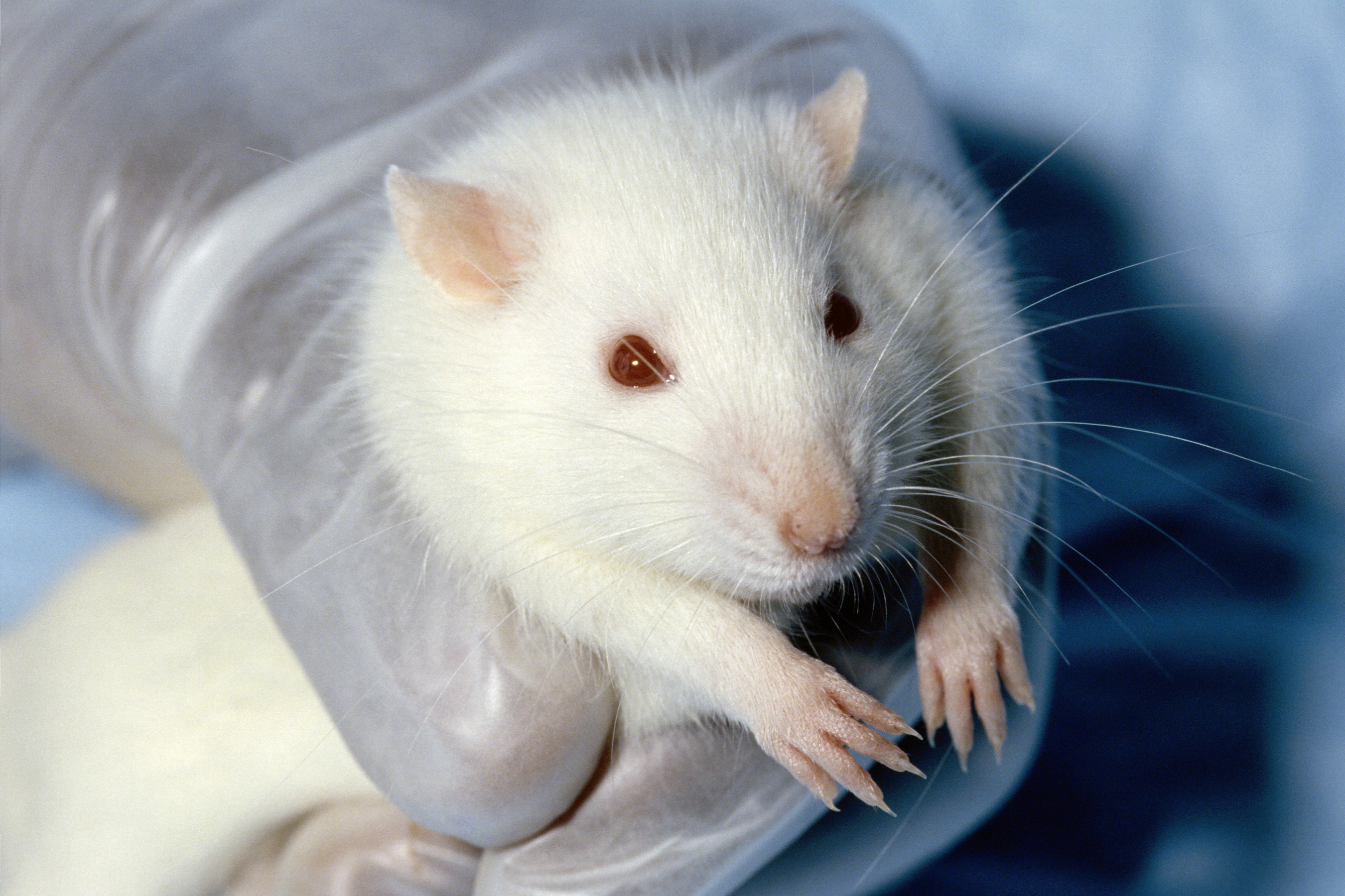 Animal, Rat, Lobund-Wistar